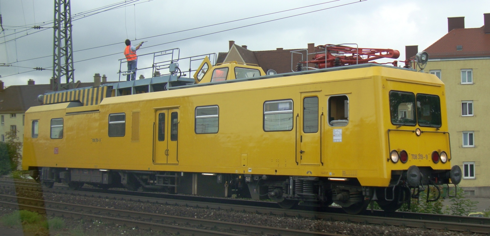 Oberleitungsrevisionstriebwagen (ORT) 708 319-9 zwischen Augsburg Hauptbahnhof und Augsburg-Oberhausen